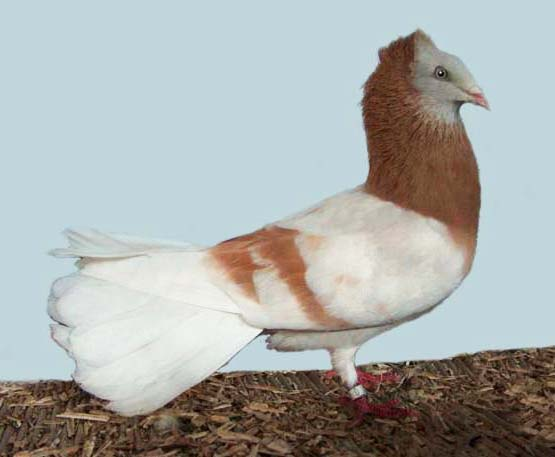 Danzig Highflier (Cream)